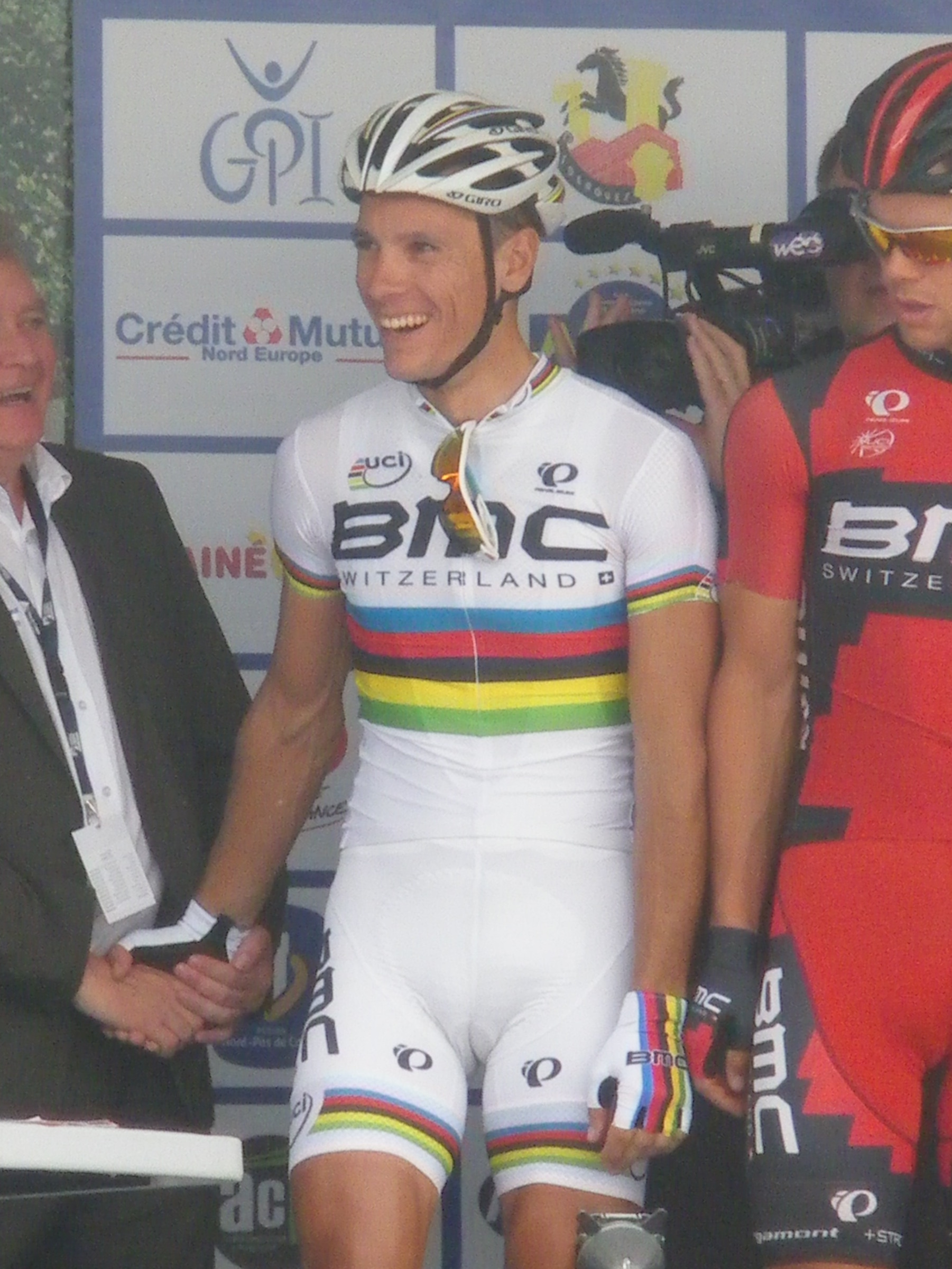 Philippe Gilbert lors du Grand Prix d'Isbergues 2013.